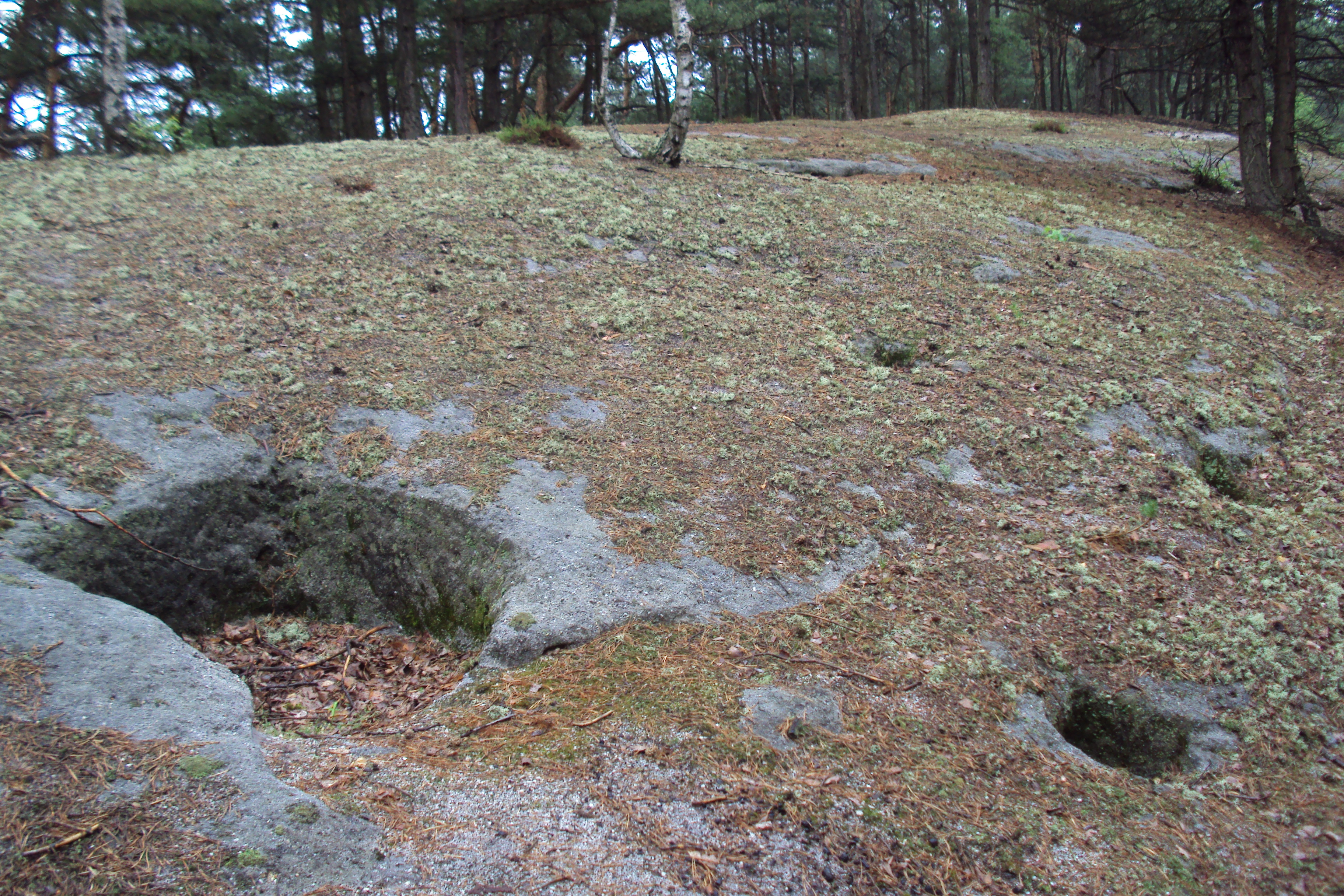 Skalnatý Konvalinkový vrch poblíž Máchova jezera